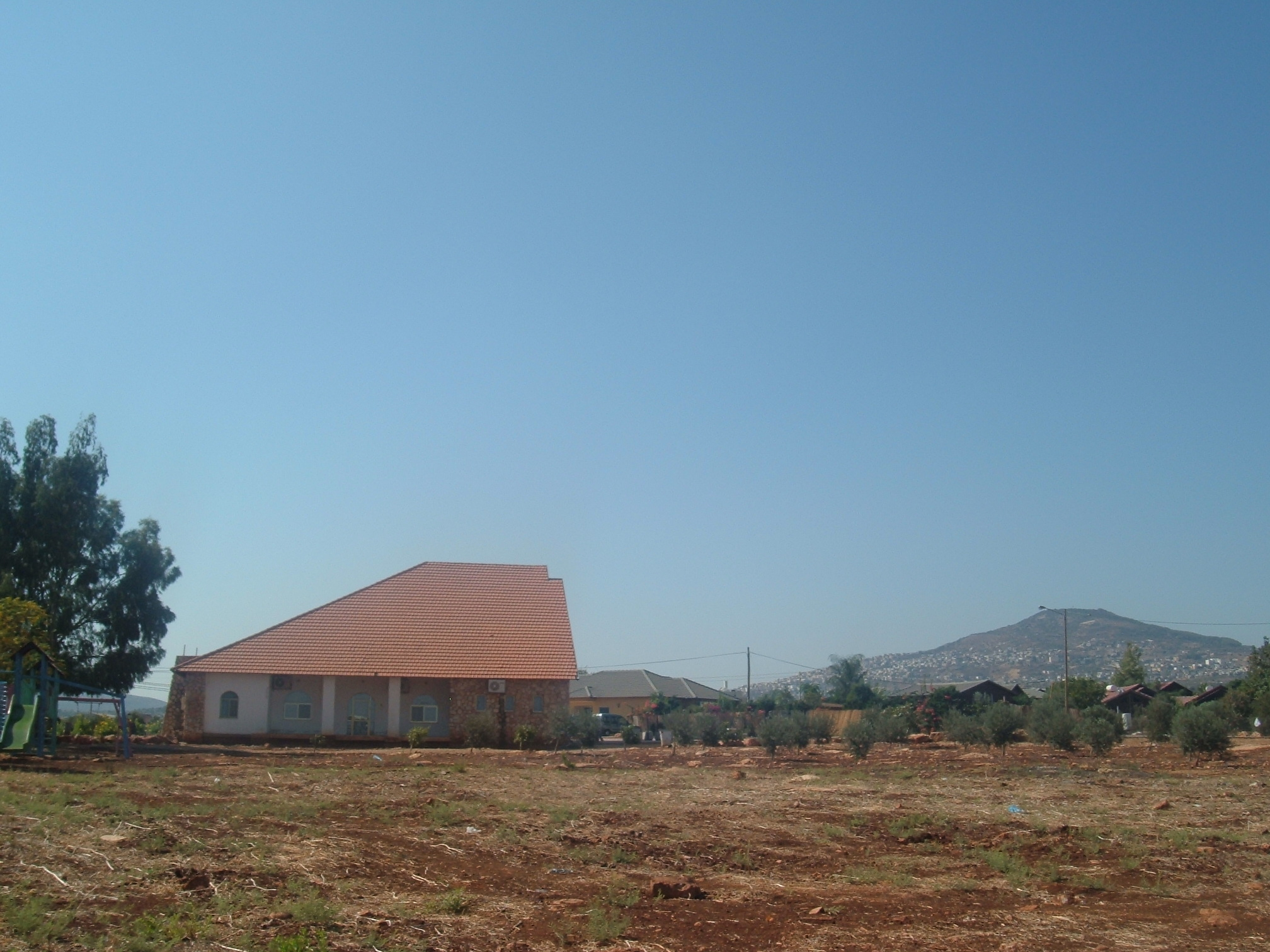 synagogue in Kalamit, Israel בית הכנסת במושב כלנית, ישראל